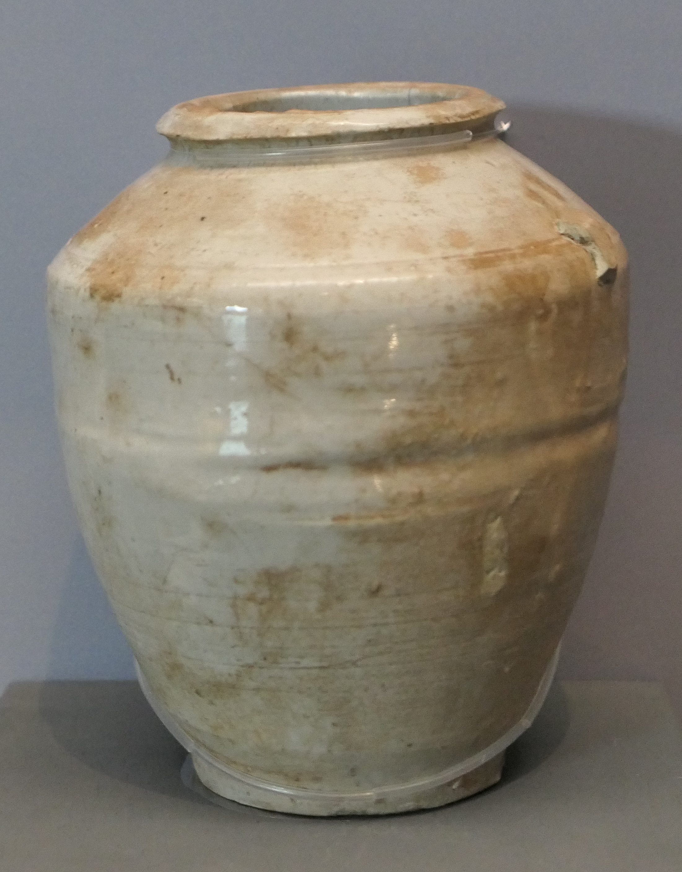 中文（台灣）: 安平壺，攝於國立臺灣歷史博物館